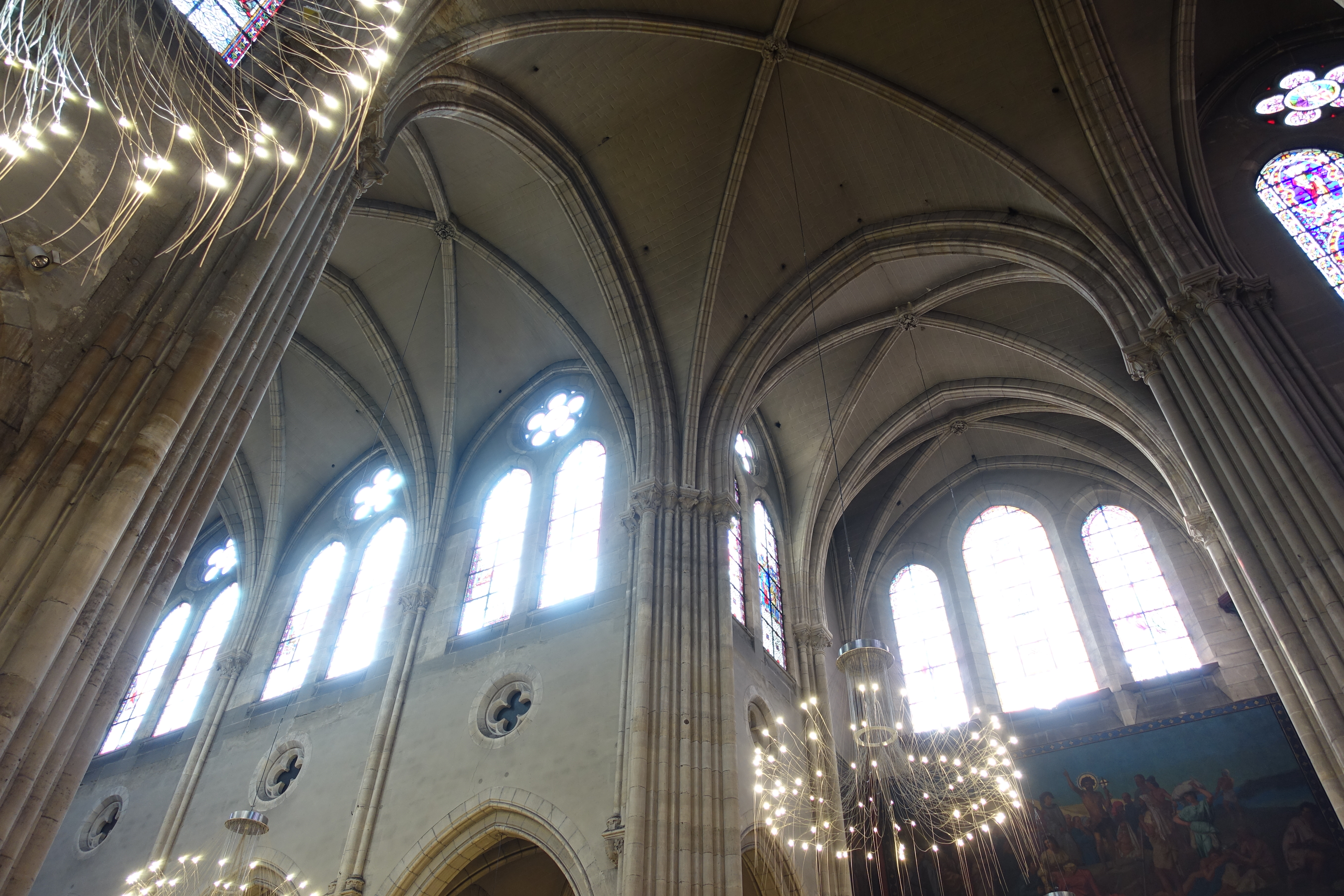 Eglise Saint-Jean-Baptiste de Belleville @ Paris 19 Saint-Jean-Baptiste-de-Belleville, 139 Rue de Belleville, 75019 Paris, France.